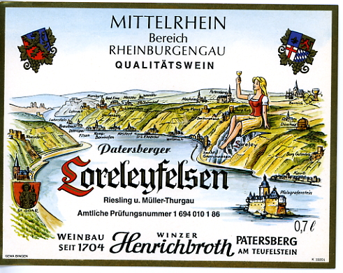 Etiquette de la cuvée 1985, Patersberger Loreleyfelsen. Winzer Henrichbroth. Belle image des villages autour de Loreley.